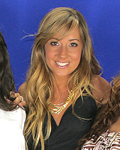 Vivi Fernandes.